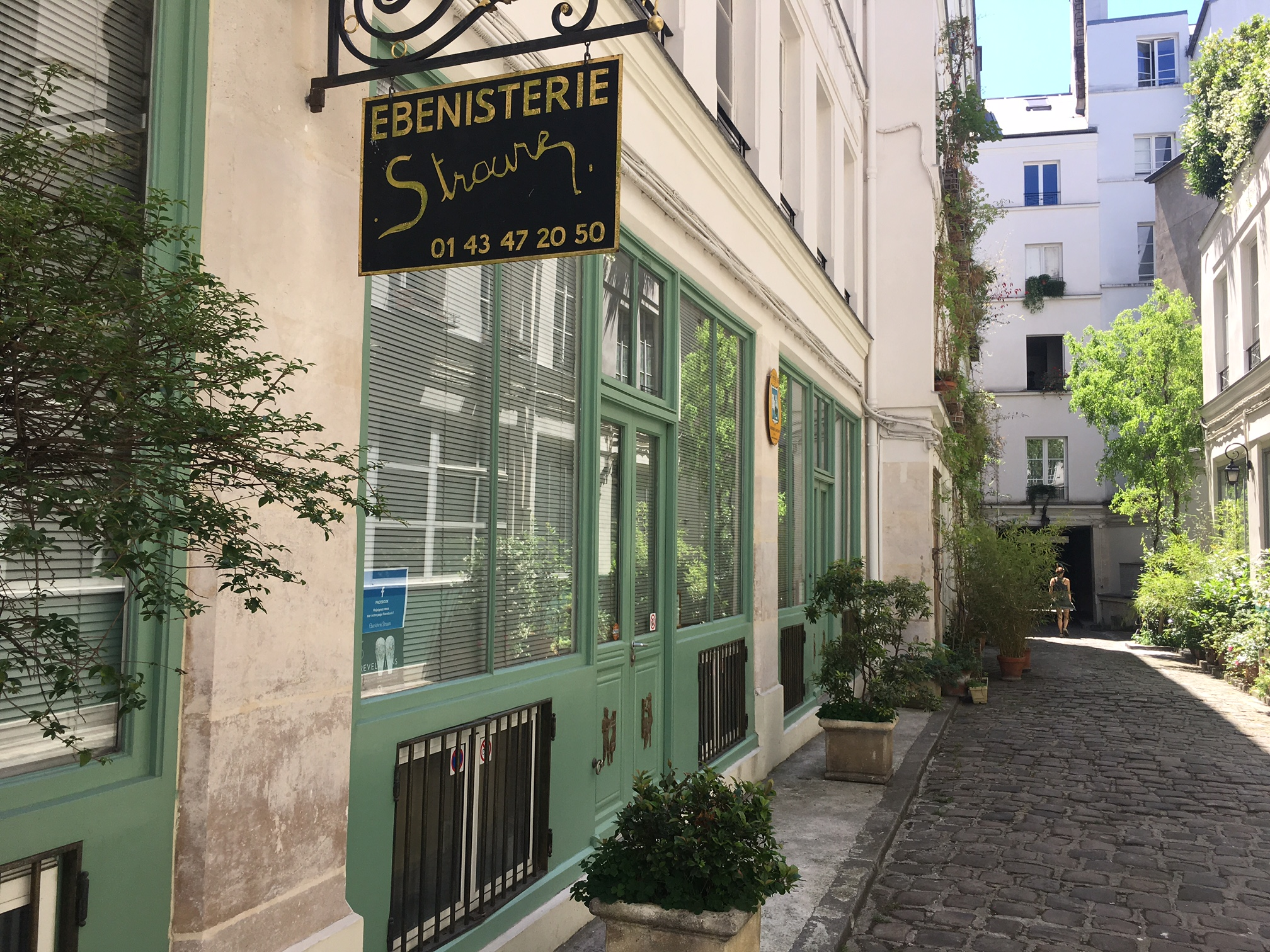 Face de la chaiserie Straure